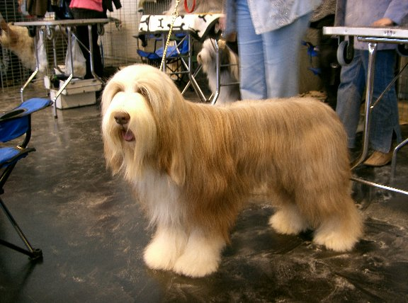 Bearded Collie auf der CACIB in Rostock 2004 Ort: CACIB in Rostock am 09.10.2004 Andere Bilder: Bearded Collie.jpg; Bearded Collie3.jpg Afbeelding:Hondenras Bearded Collie.jpg